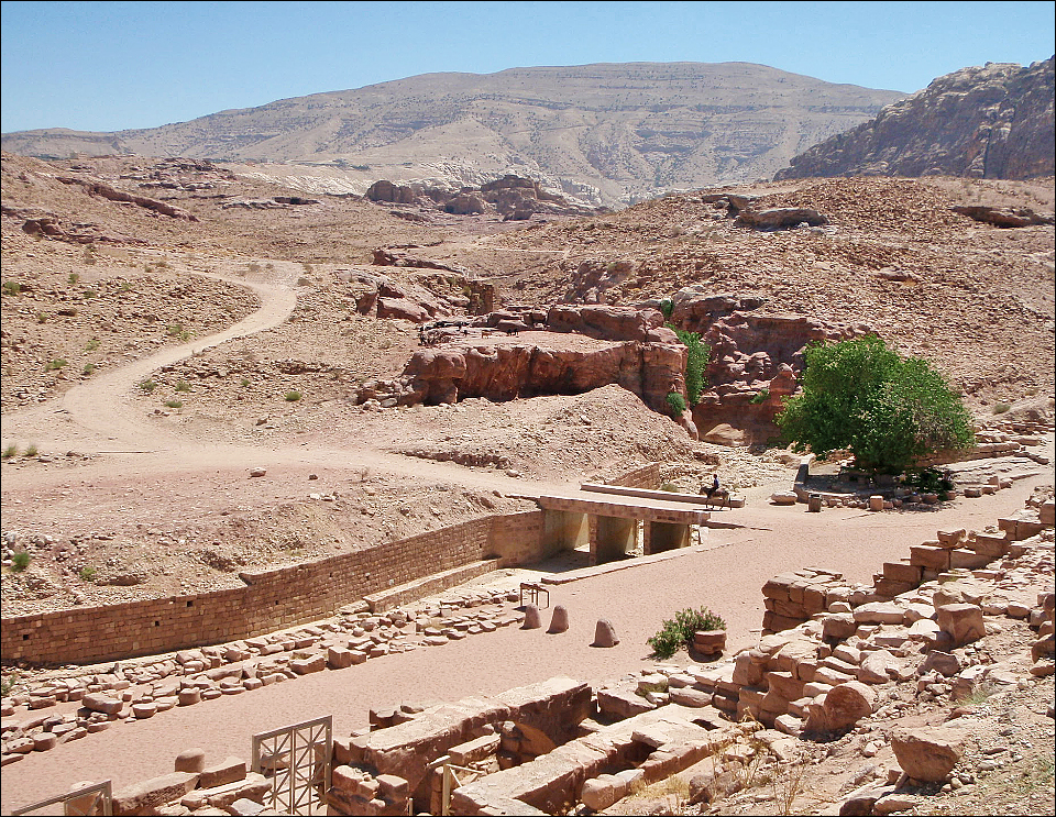 Aménagement de la traversée du wadi afin d'éviter les inondation du centre ville.